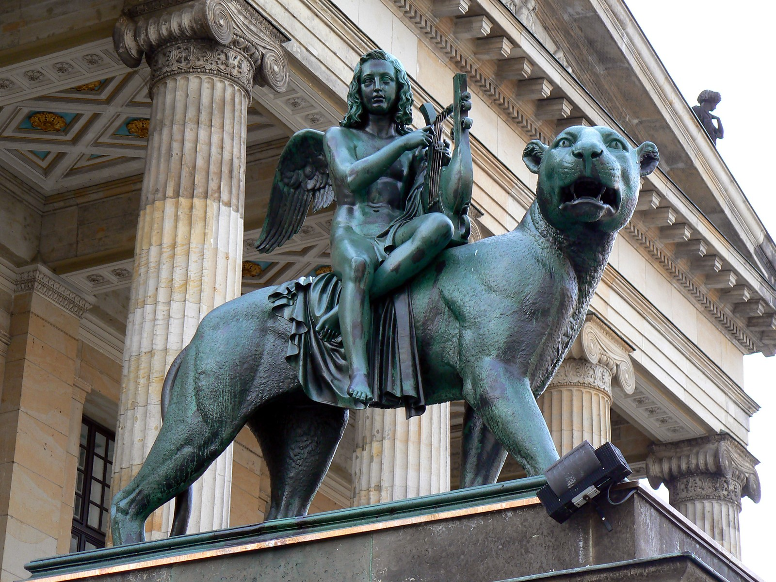 Bacchus auf dem Panther, Statue am Eingang des Berliner Konzerthauses auf dem Gendarmenmarkt. Berlin-Mitte/Berlin/Germany